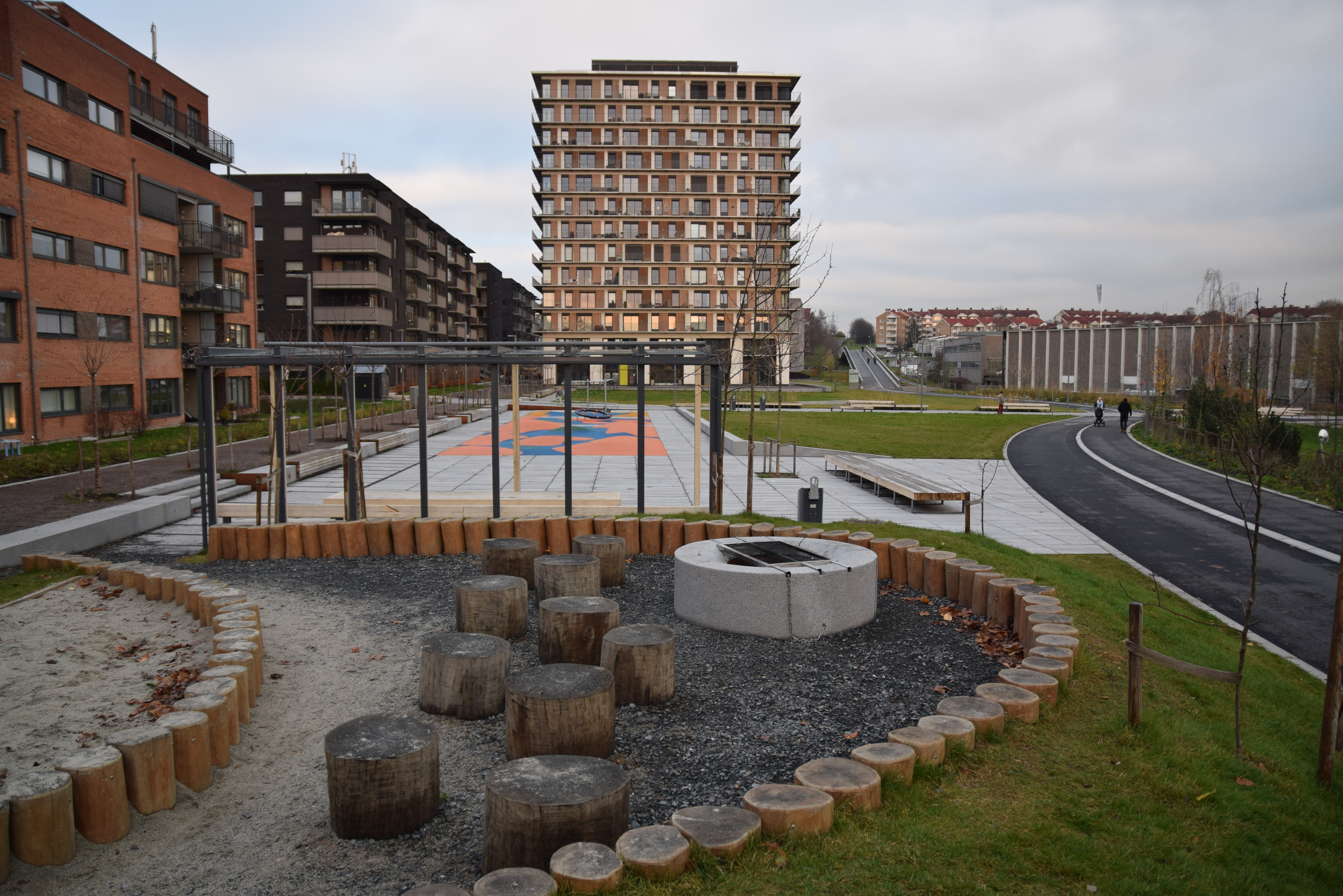 Tiedemannsparken, Ensjø, Oslo, sett mot nord